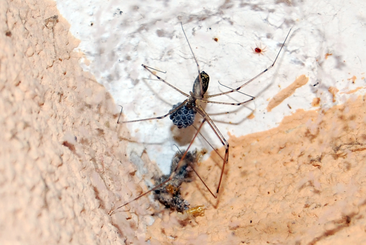 Araignée (espèce inconnue) avec ses œufs.